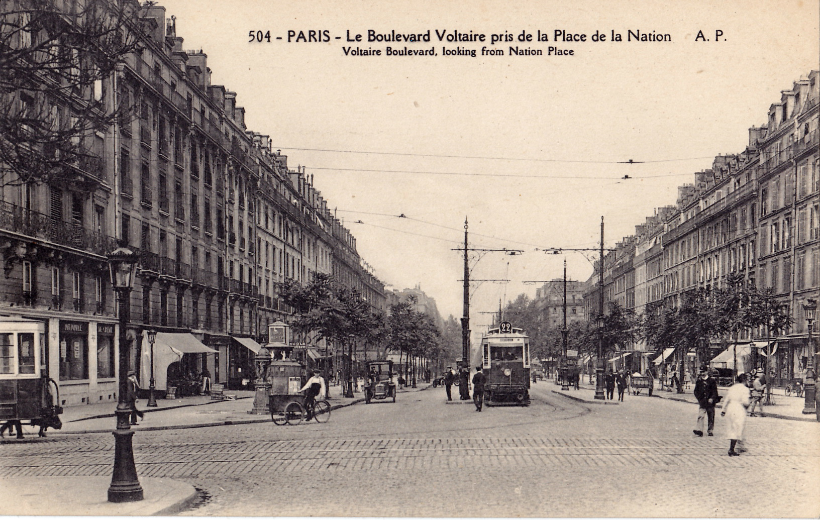 Carte postale ancienne éditée par AP, n°504 :PARIS - Le Boulevard Voltaire pris de la Place de la Nation